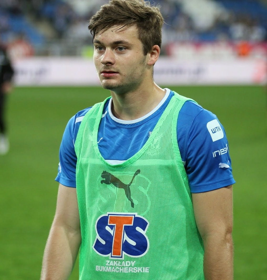 Karol Linetty na rozgrzewce przed meczem Lecha Poznań.